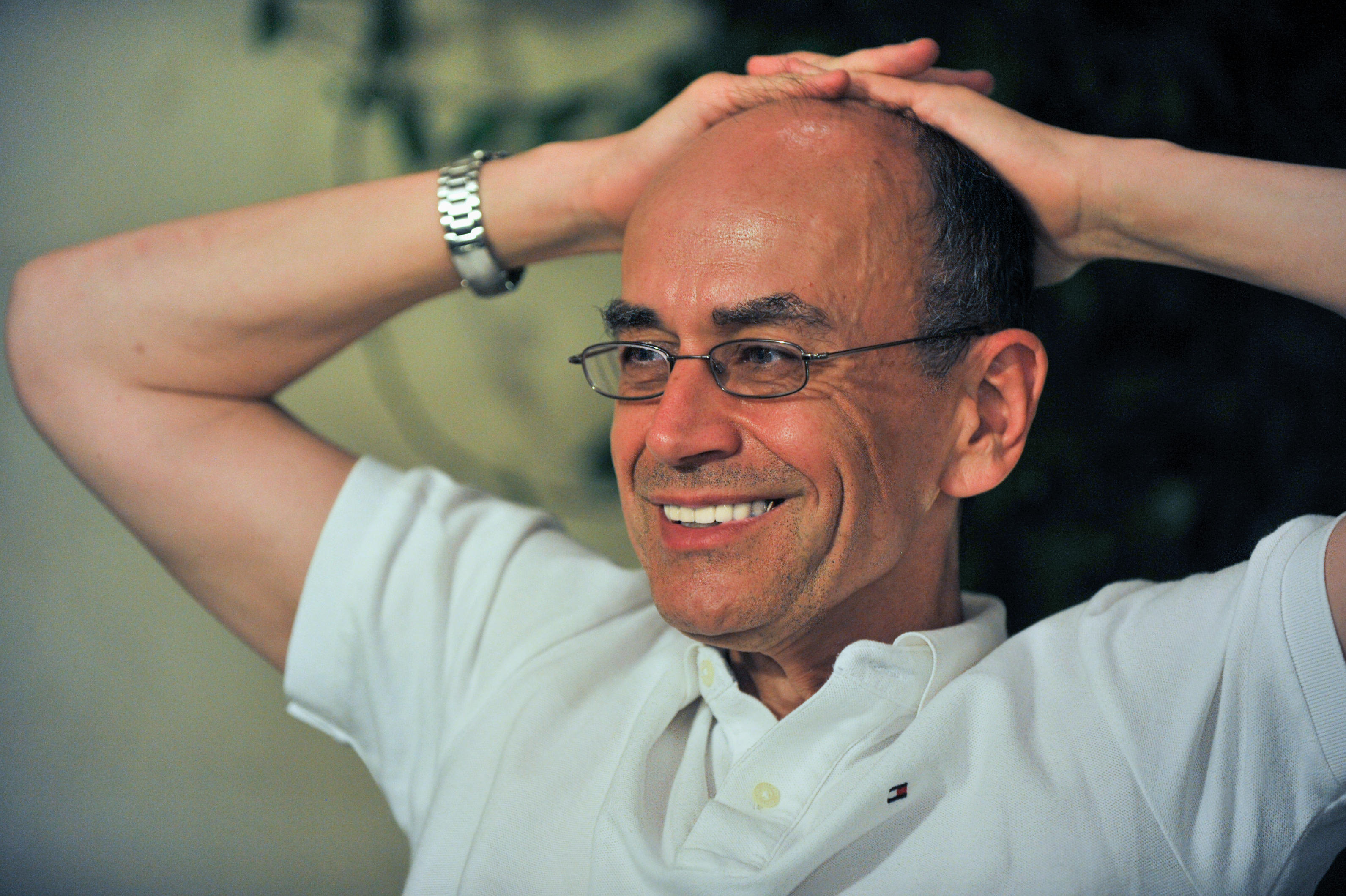 Thomas C. Südhof en Baeza (7-10-2013) tras conocer que era Premio Nobel de Medicina